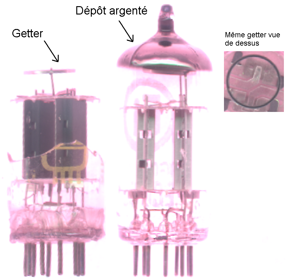 Schéma getter. Photo personnelle. Catégorie:Tube électronique